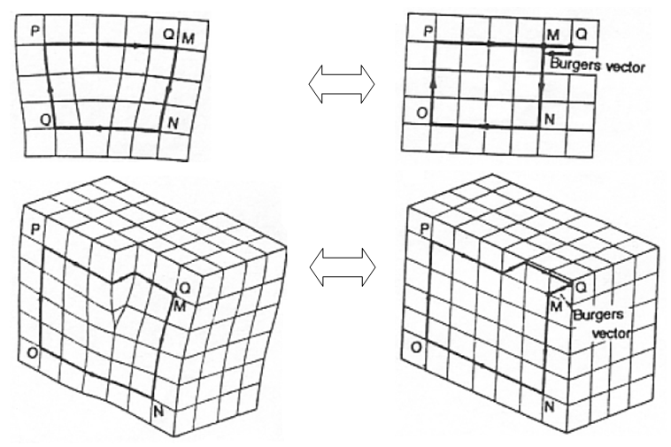 Circuito para el vector de Burgers. David Gabriel García Andrade. Estudiante de Ingenieria Industrial. Universidad Autónoma Metropolitana. UAM México.